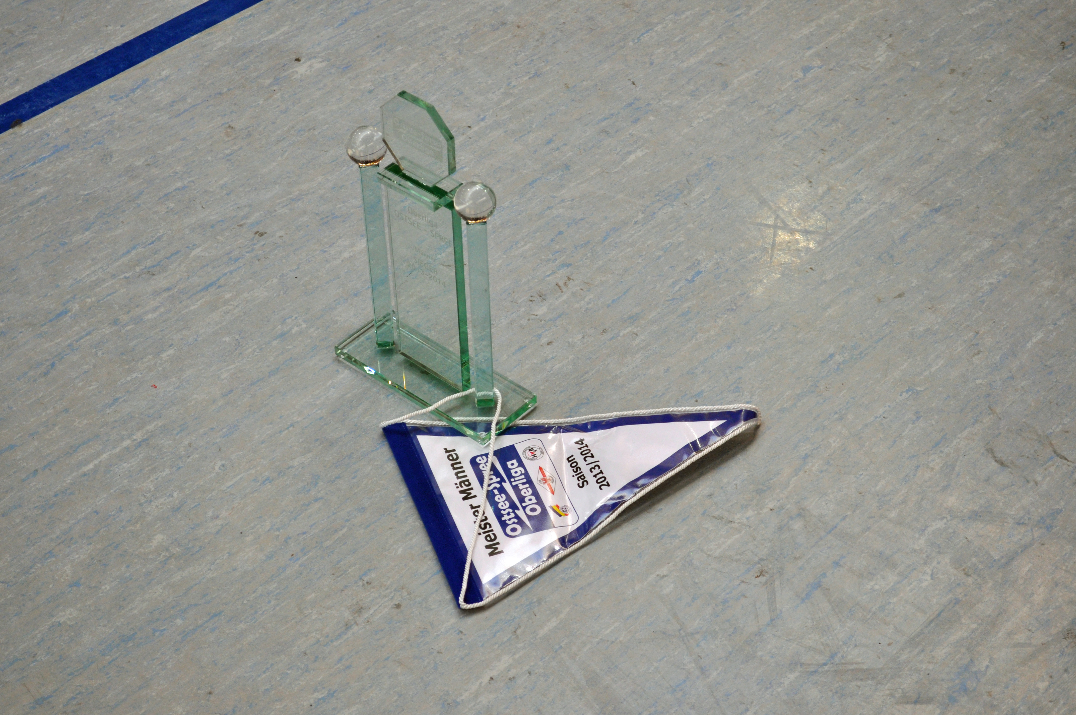 Die erste Männer-Mannschaft des Stralsunder HV nach dem Punktspiel am 26.4.2014 gegen den Lausitzer HC in der Vogelsanghalle Stralsund. Durch den 37:28-Sieg wurde das Team Meister der Oberliga Ostsee-Spree und steht als Aufsteiger in die 3. Liga (DHB) fest. Im Bild der Pokal und der Siegerwimpel.